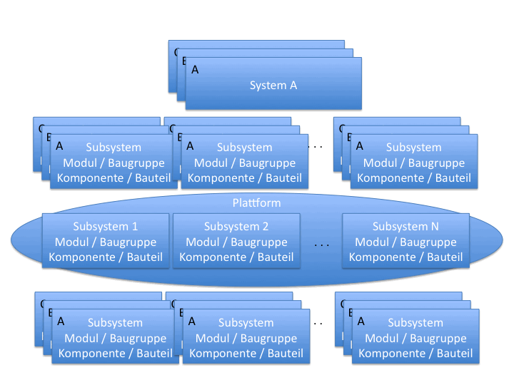 Beispiel für eine Plattform